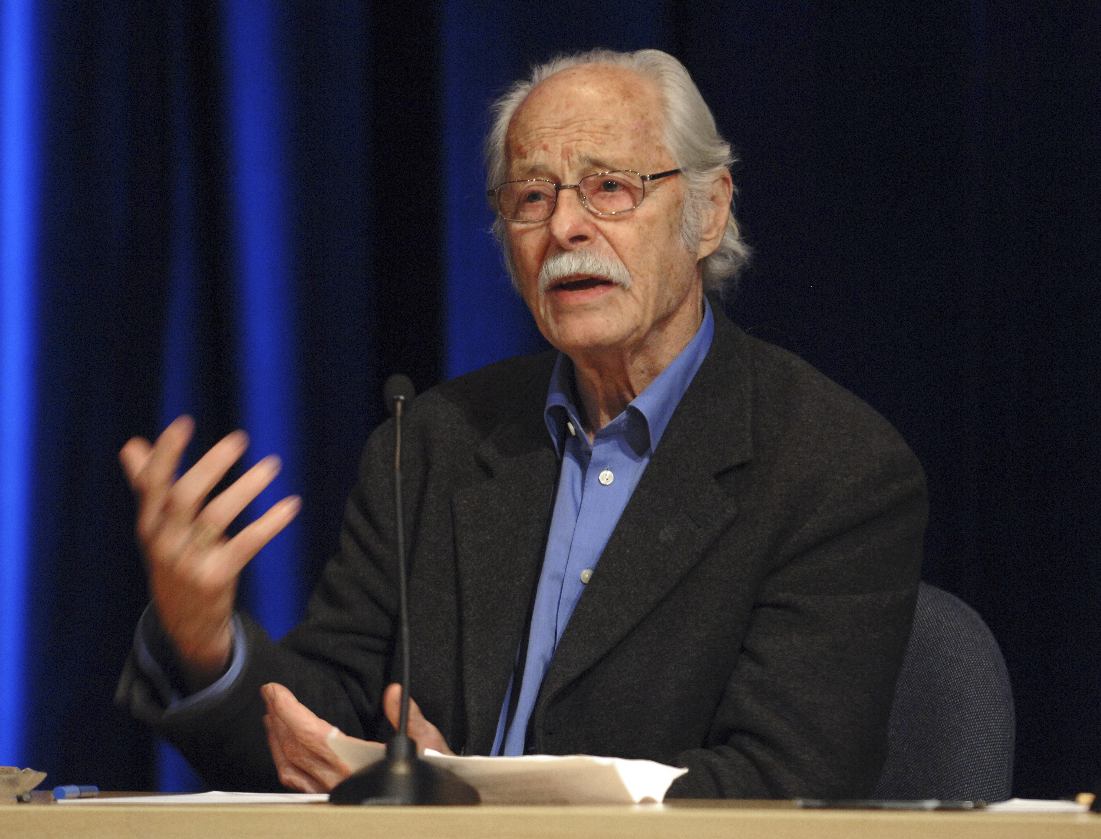 BERGEN 20061128;. Fredrik Barth. Tidligere professor i sosialantropologi ved Universitetet i Bergen og direktør for de etnografiske samlinger i Oslo. Barth er en av de fremste innen internasjonal sosialantropologi.